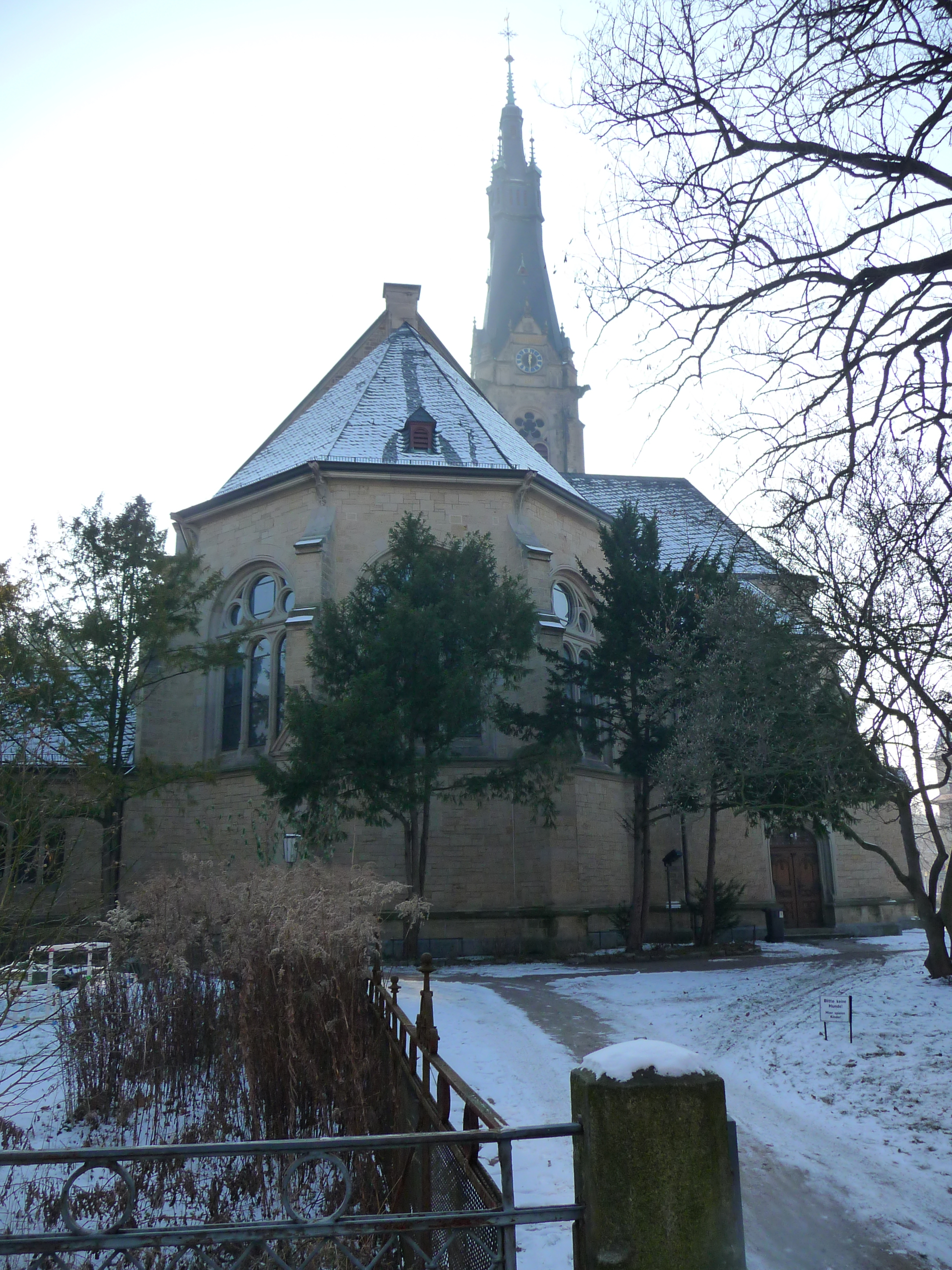 Heidelberg (Weststadt) - evangelische Christuskirche, Ansicht von Norden